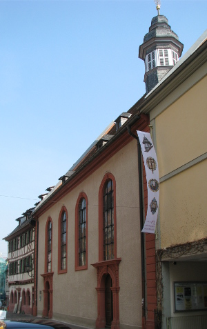 Evangelische Stadtkirche in Weinheim.